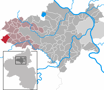 Lage der Gemeinde Boos